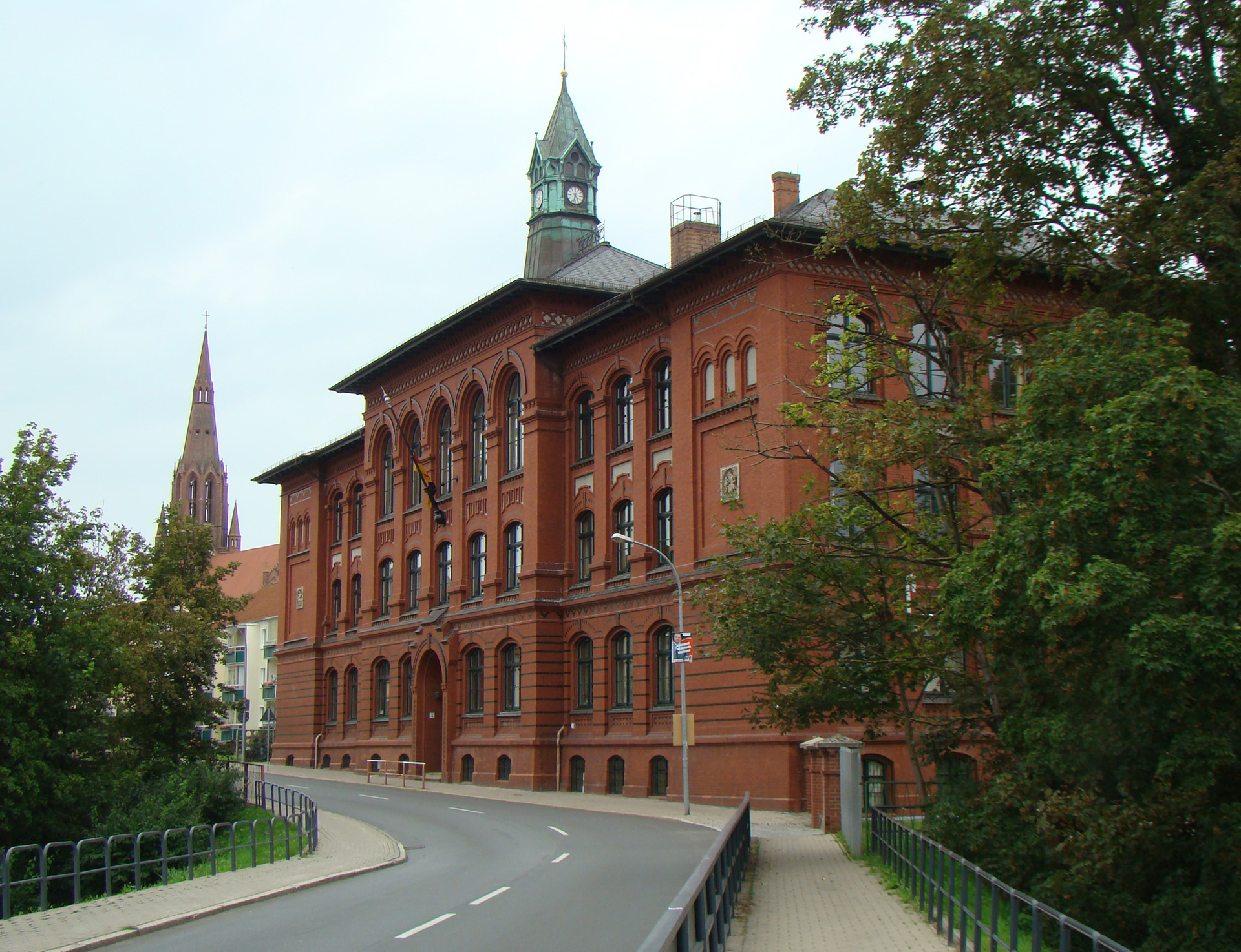 Fritz-Reuter-Schule in Demmin, auch als Rote Schule bezeichnet